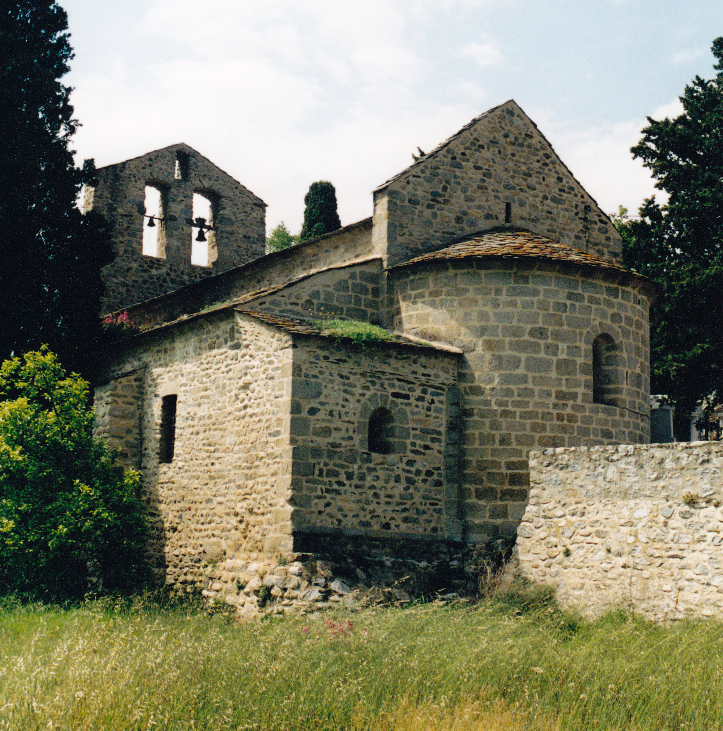 France - Pyrénées-Orientales - Conflent - Chapelle Saint-Vincent d'Eus